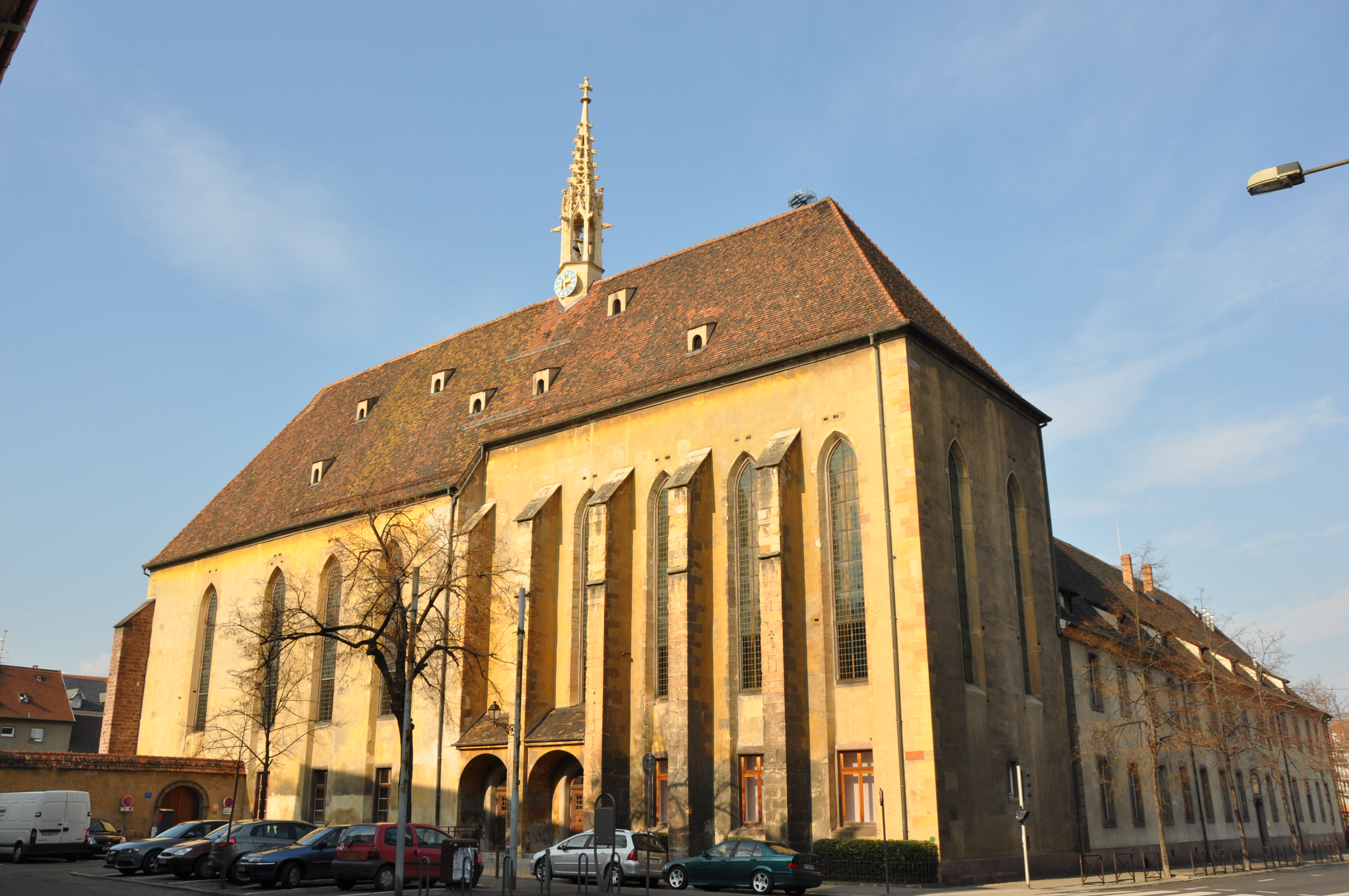 Ancienne Eglise des Catherinettes